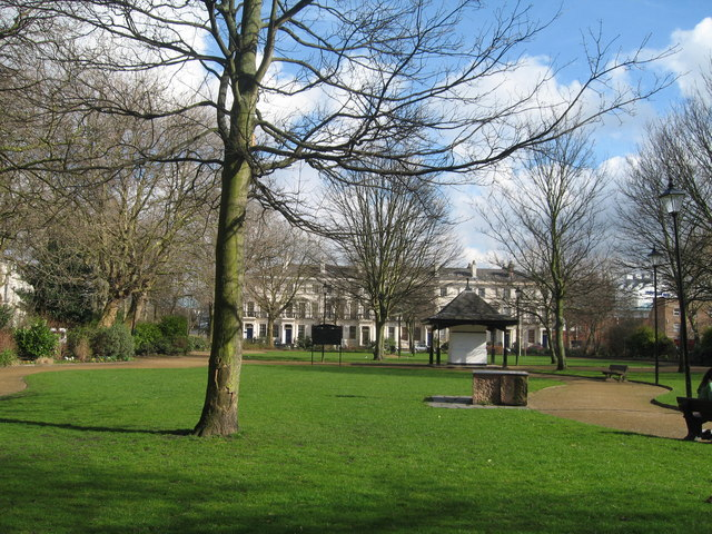 Falkner Square